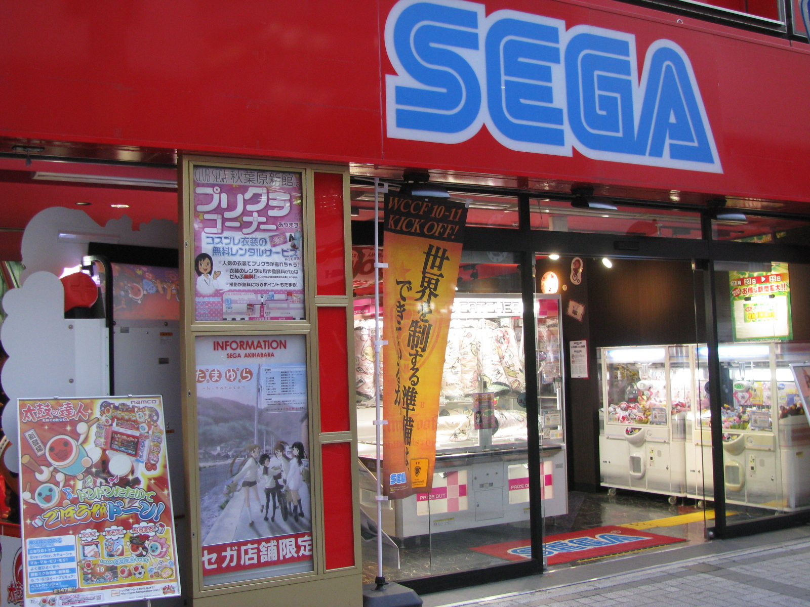 Amusement arcade SEGA Akihabara. 1-15-9 Soto-kanda, Chiyoda, Tokyo.